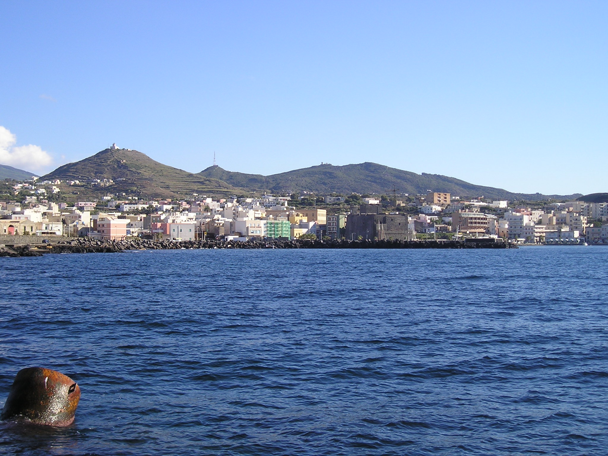 centro abitato di Pantelleria, Italy